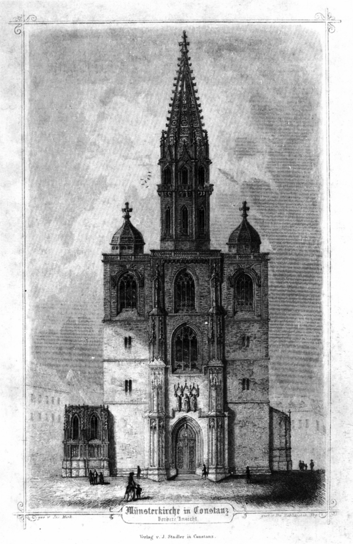 Das Bild zeigt das Münster während der kurzen Zeit zwischen Vollendung der Turmspitze 1853 und dem Abriss der Hauben auf den Seitentürmen 1854. Der Zeichner Dyckerhoff war selbst an den Bauarbeiten beteiligt.